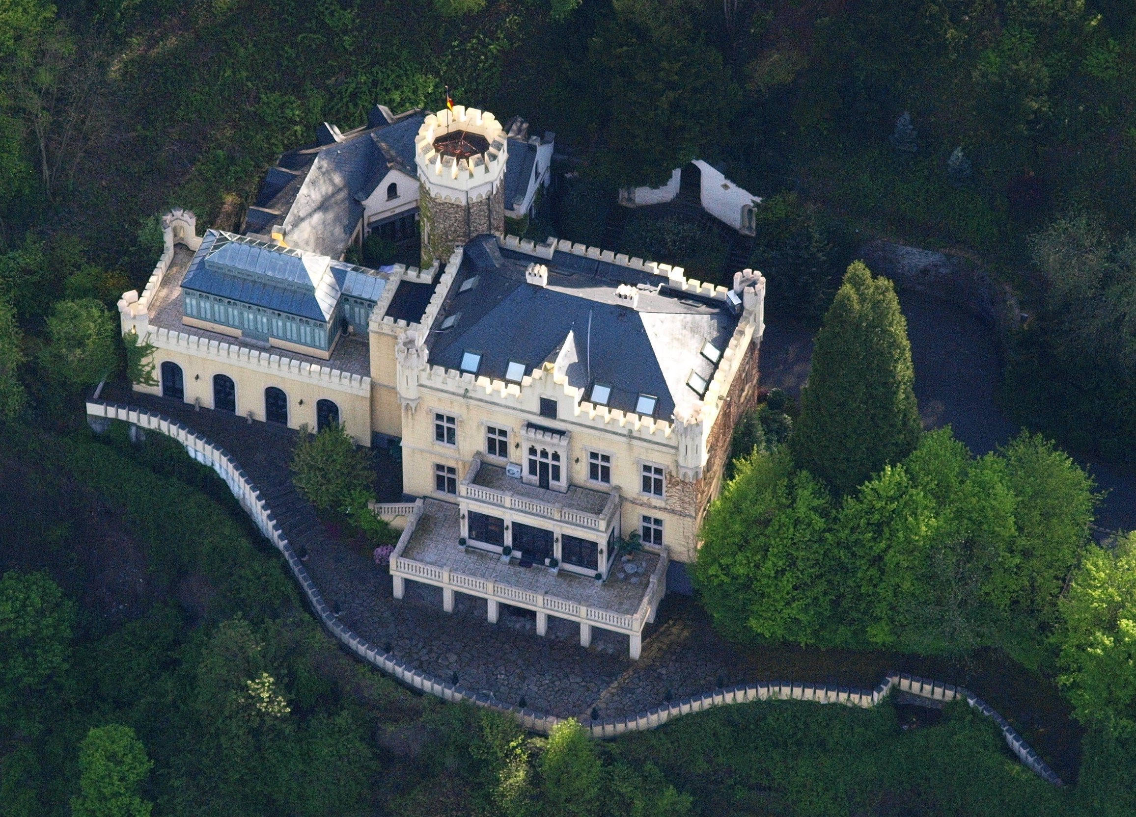 Schloss Marienfels: Luftaufnahme